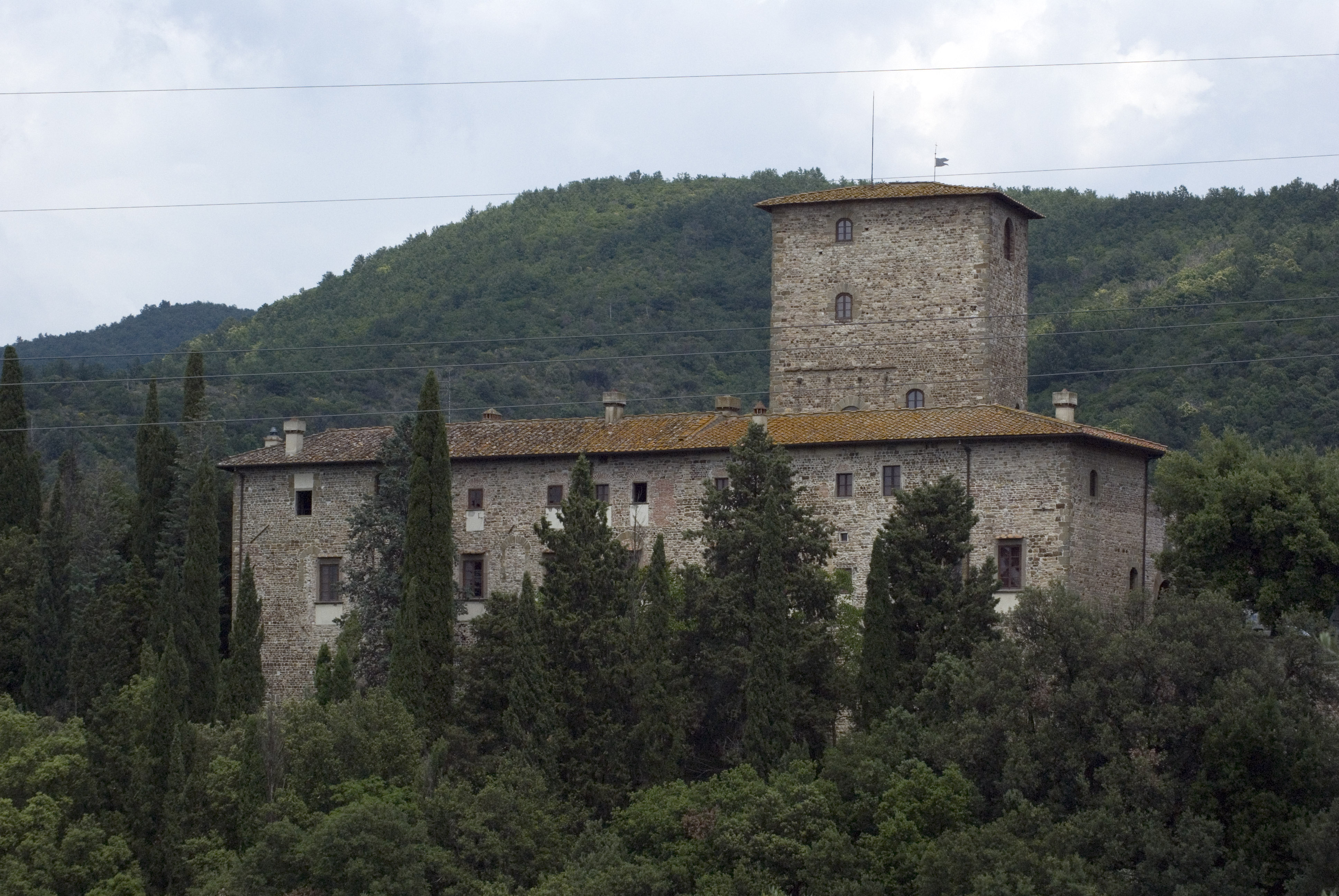 Castello di Mugnana (Greve in Chianti)